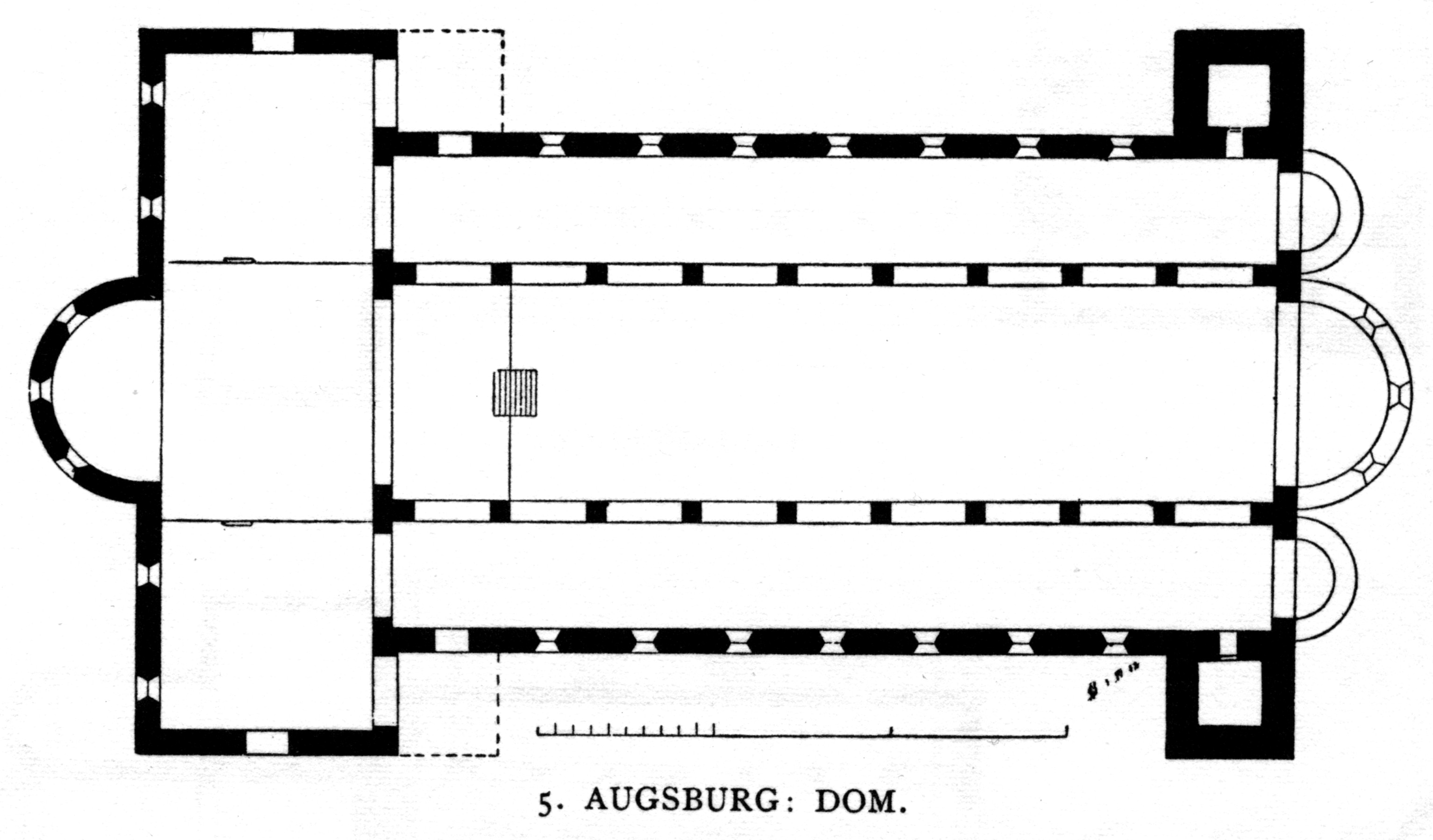 Augsburg, Dom, floor plan.